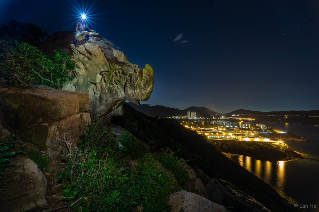 中文（香港）: 犀牛石因形態似犀牛而命名